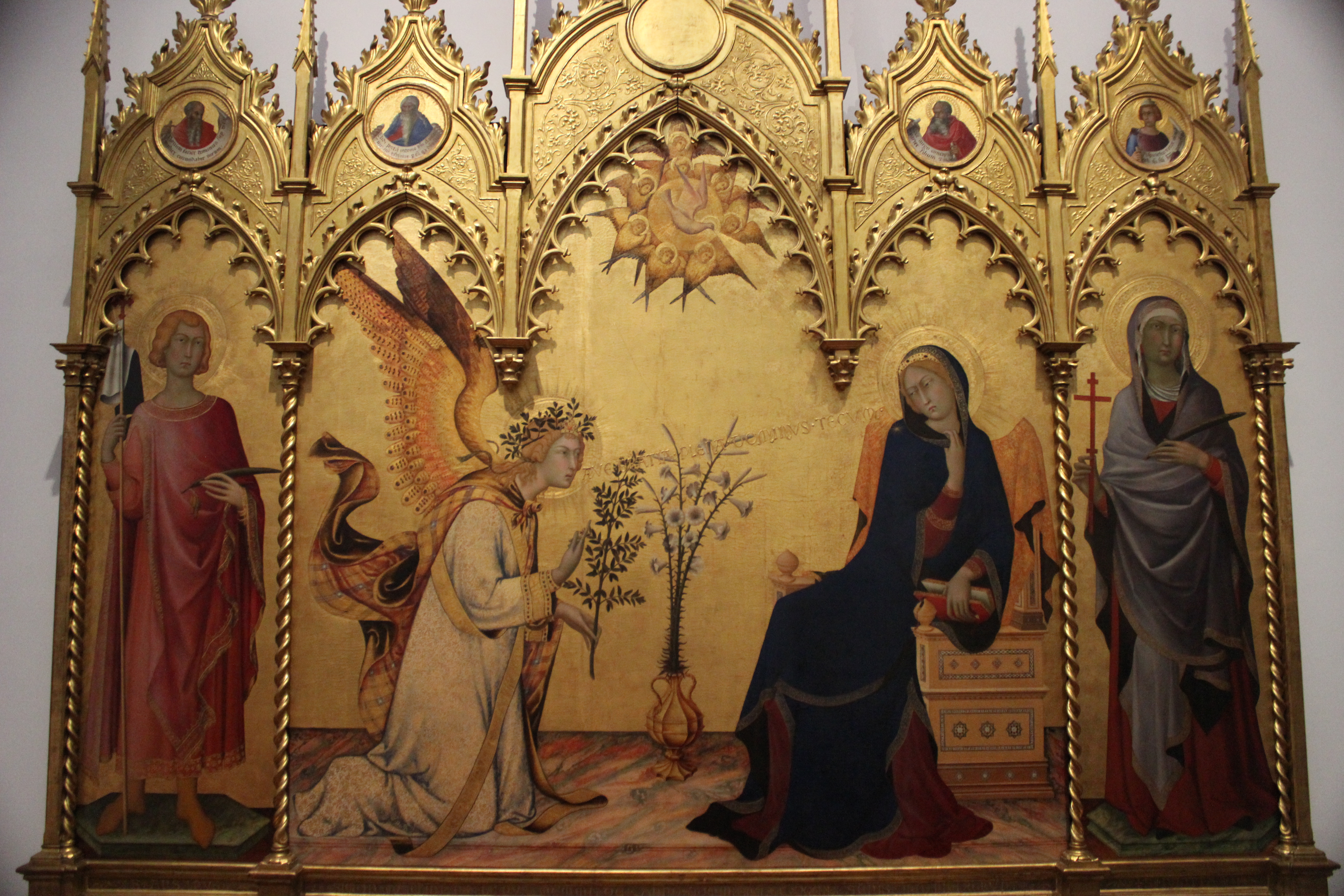 Simone Martini. Anunciación, Uffizi.